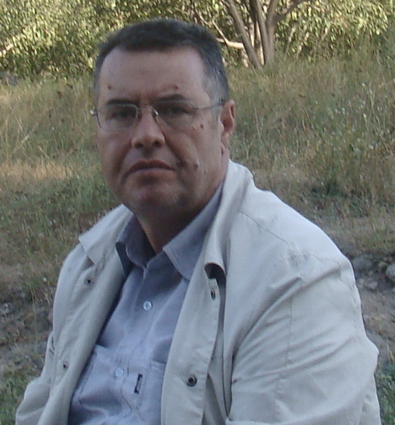 Enver Chingizoğlu